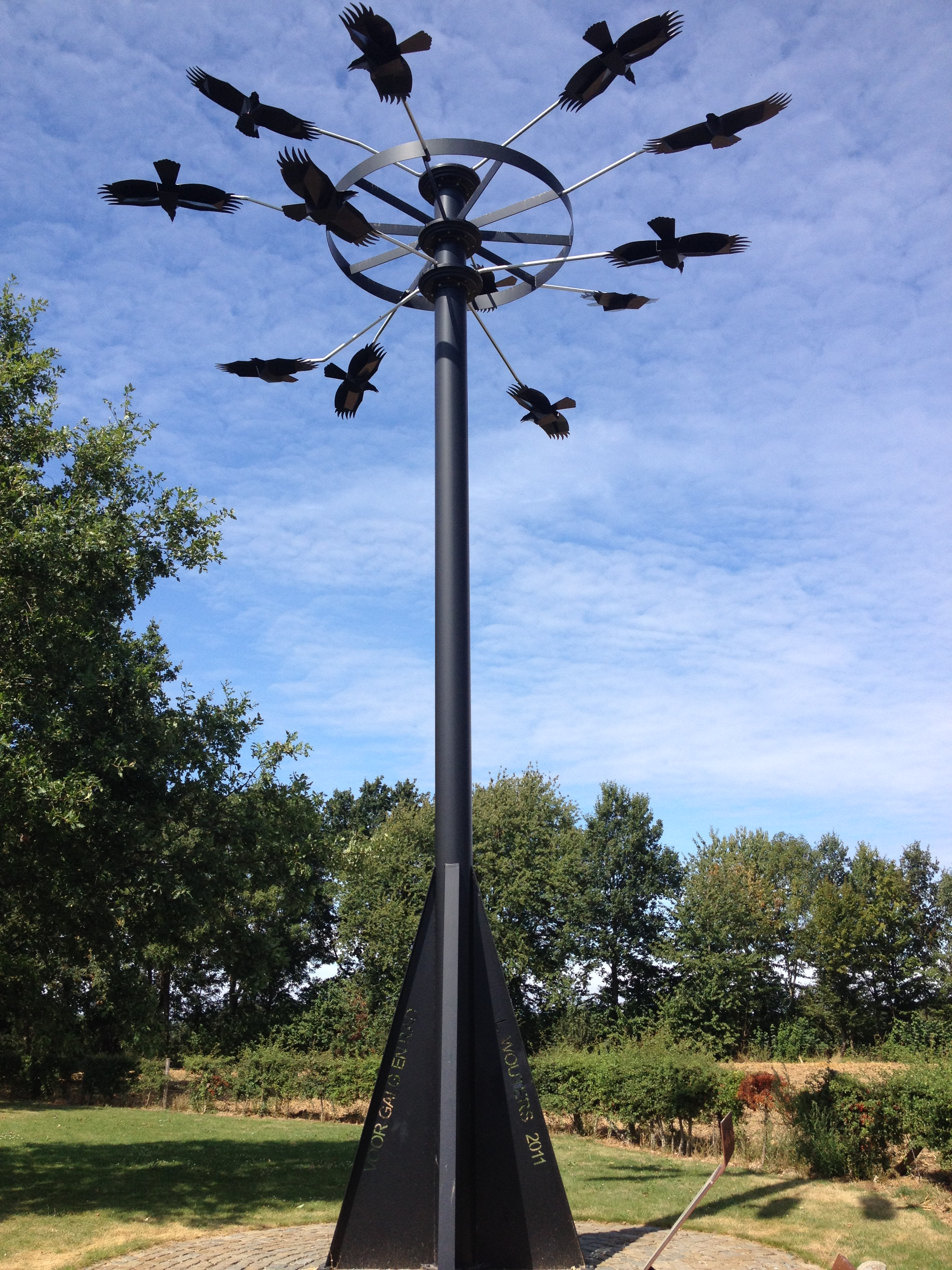 Landmark op de plek van de voormalige Galg van Mheer "Voor galg en rad" door L. Wouters 2011